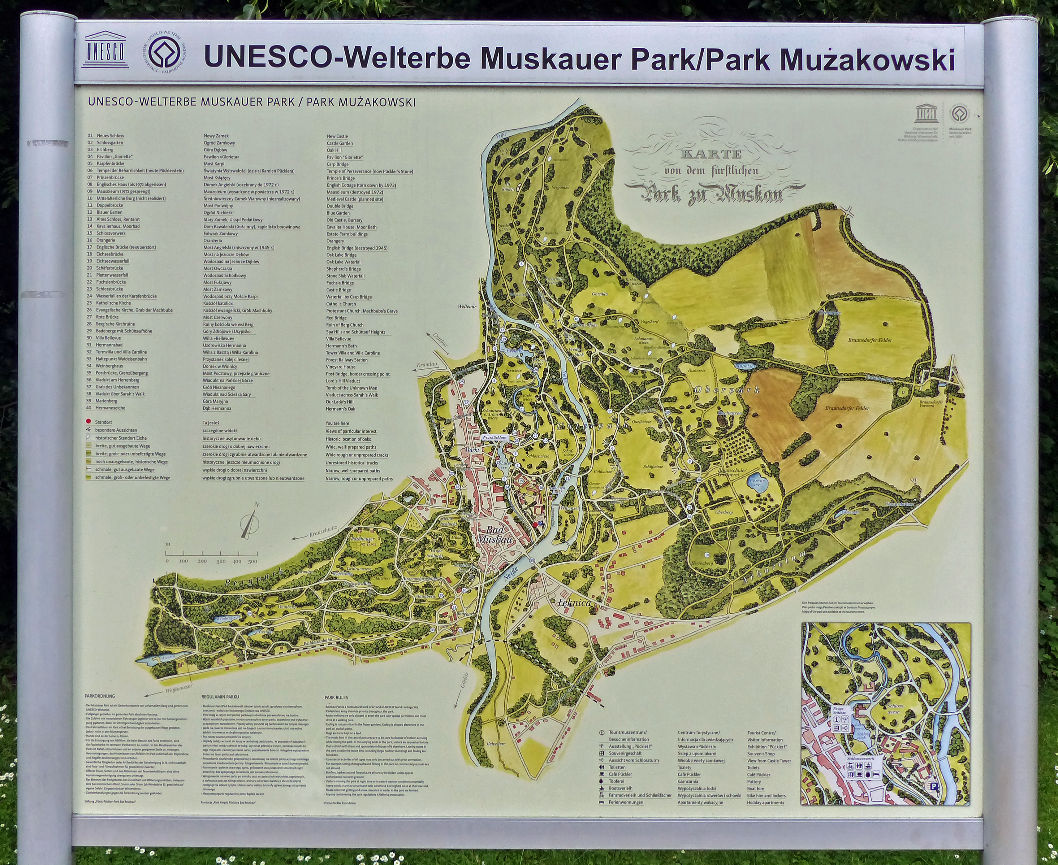 Fürst-Pückler-Park Bad Muskau, Muskauer Parklandschaft (LSG d 48)